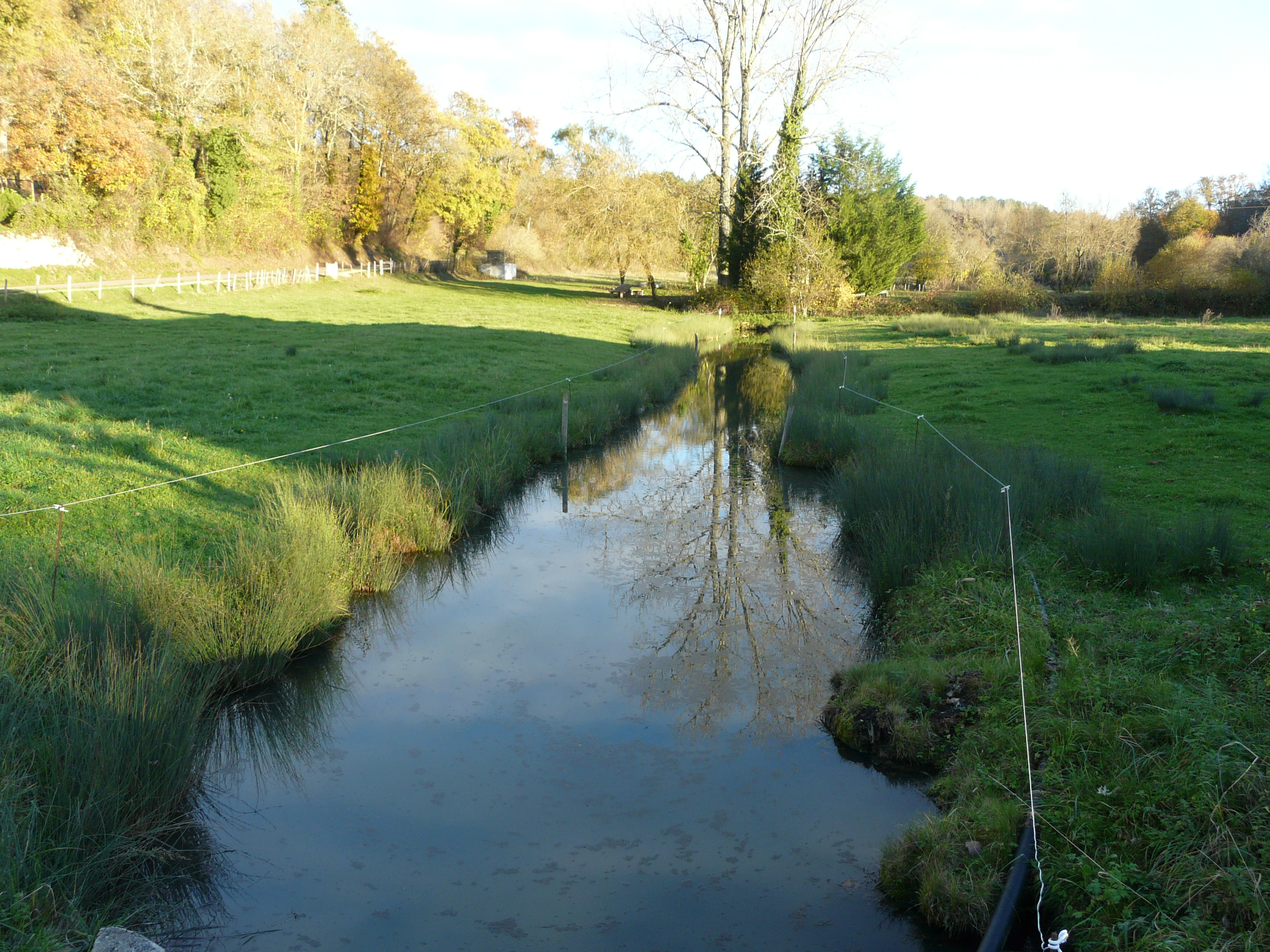 La Rase, ruisseau qui passe en contrebas de l'église de Lempzours, Dordogne, France.